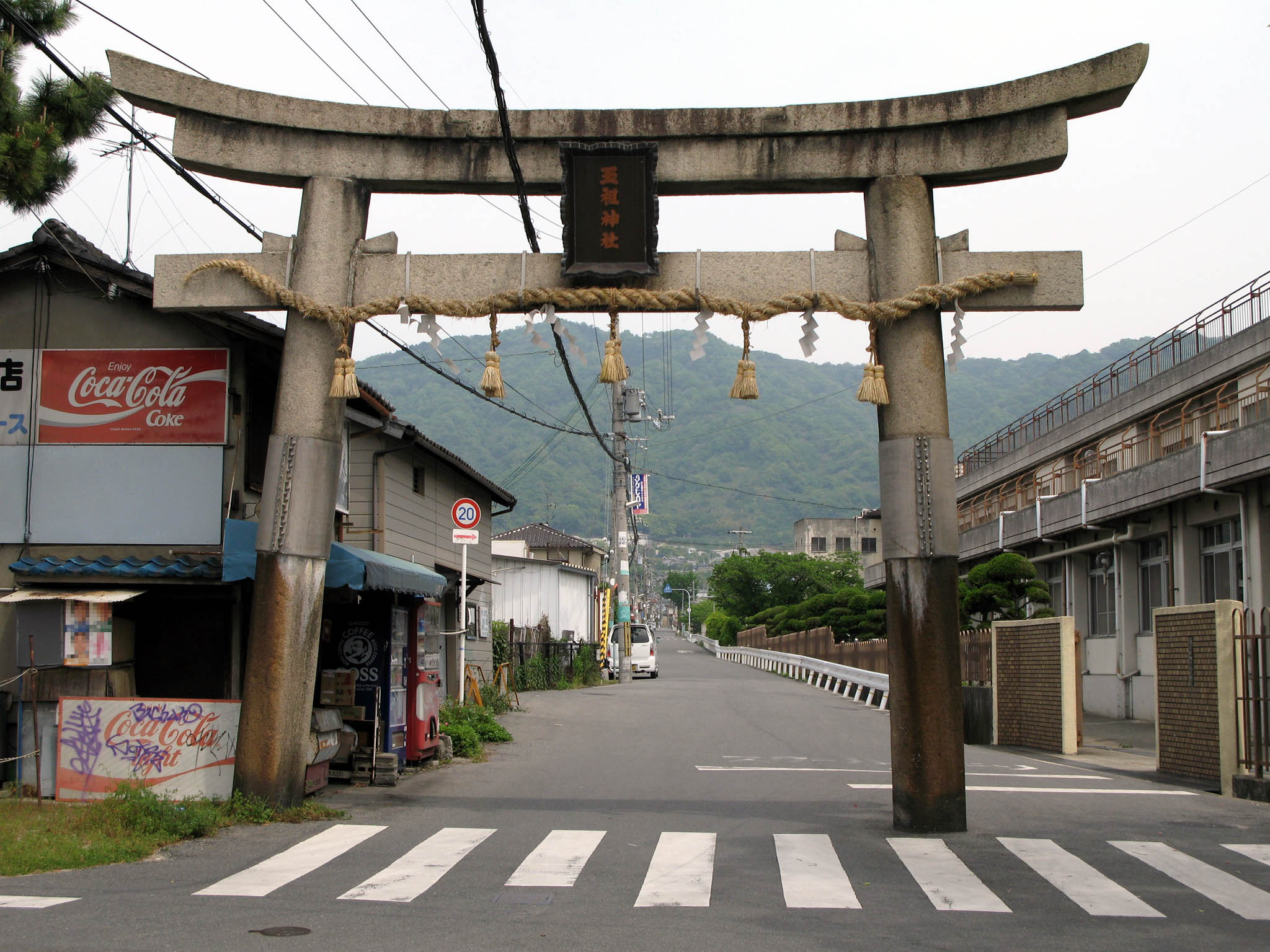 Tamaoya Shrine in Yao, Osaka, Japan